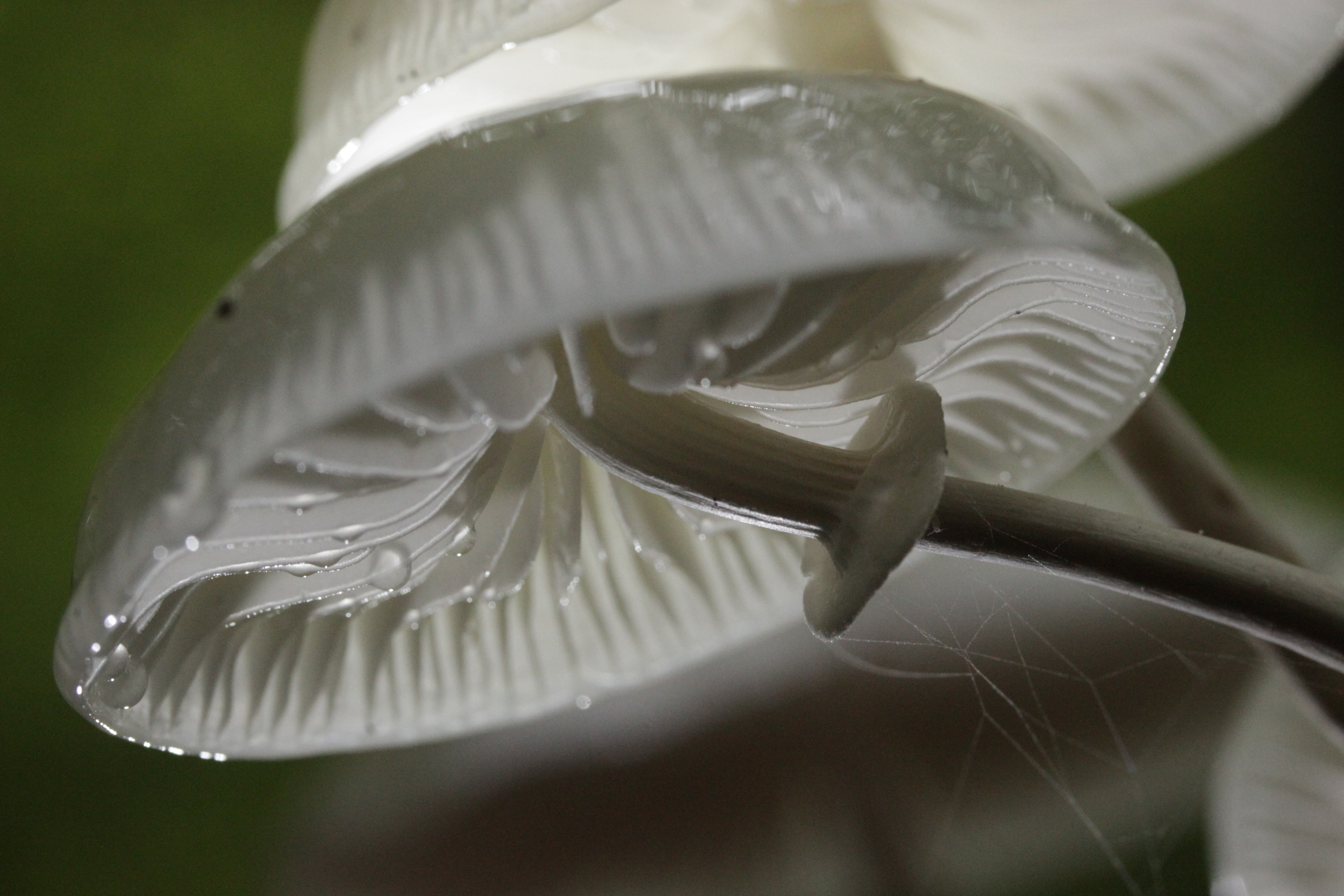 Porcelain Fungus - Oudemansiella mucida